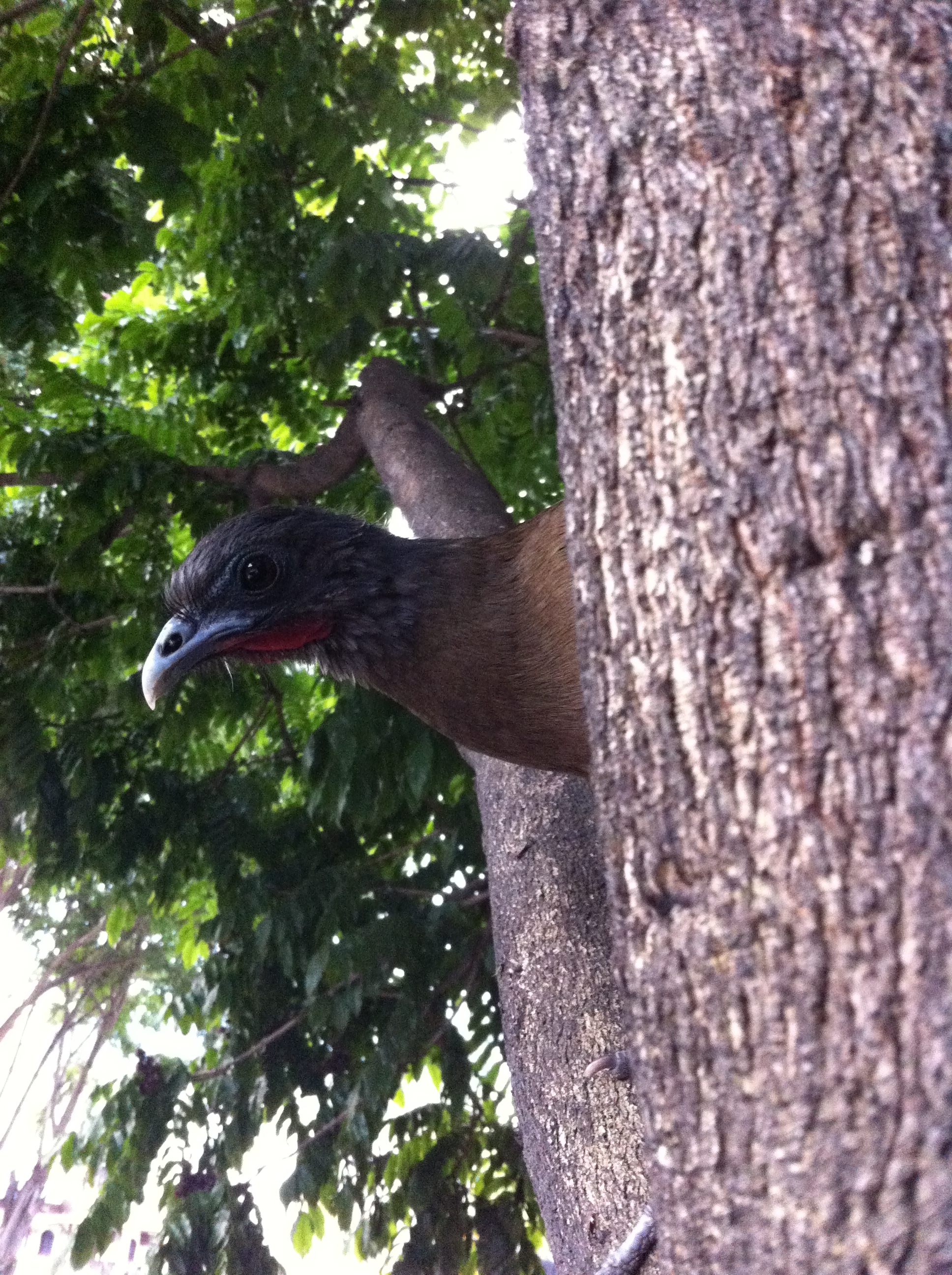 Guacharaca - Ortalis ruficauda